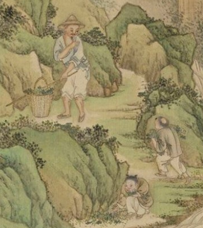 中文（香港）: 第三開〈採藥行〉：五日午時陽氣最盛，以藥草治病最具效驗。譬如“午時水”，取飲、擦身，可袪百病。